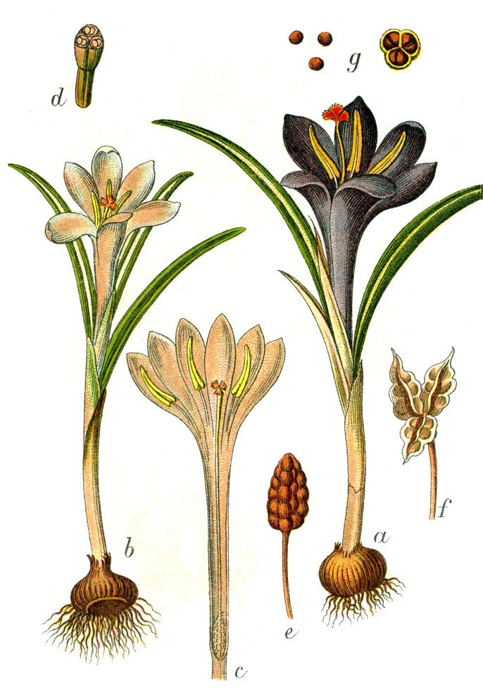 Crocus vernus subsp. vernus, syn. Crocus parviflorus (J.Gay) E.H.L.Krause, nom. ill. (1906) Original Caption Alpen-Safran, Crocus parviflorus